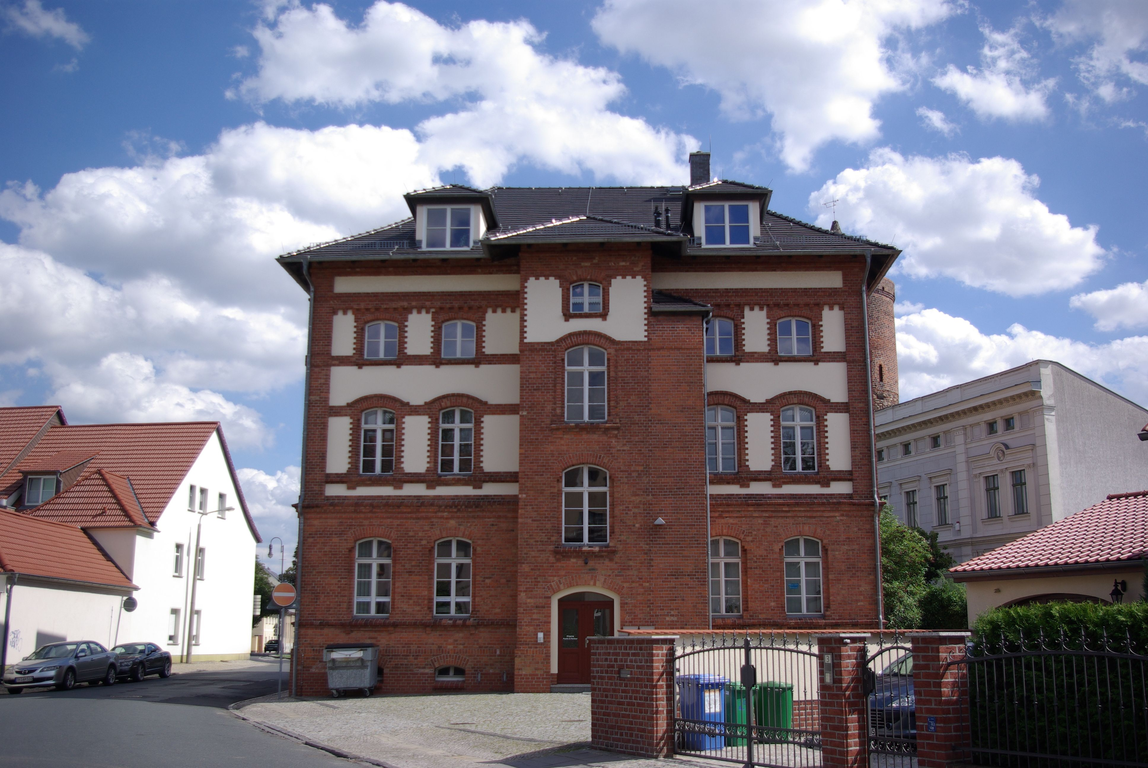 Jüterbog in Brandenburg. Das Haus in der Schillerstraße 1 steht unter Denkmalschutz.